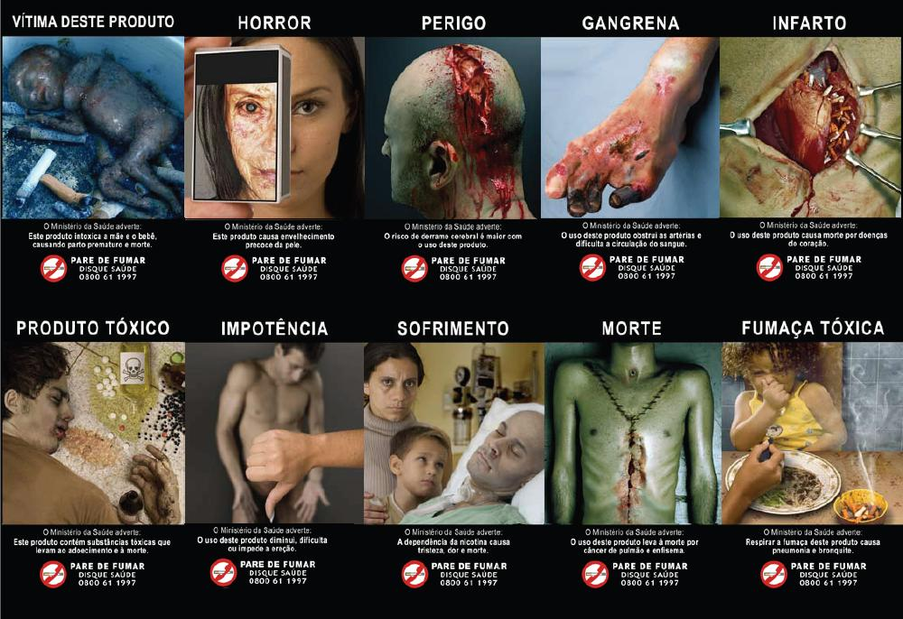 Imagens educativas em maços de cigarro obrigatórias no Brasil a partir de 2009.